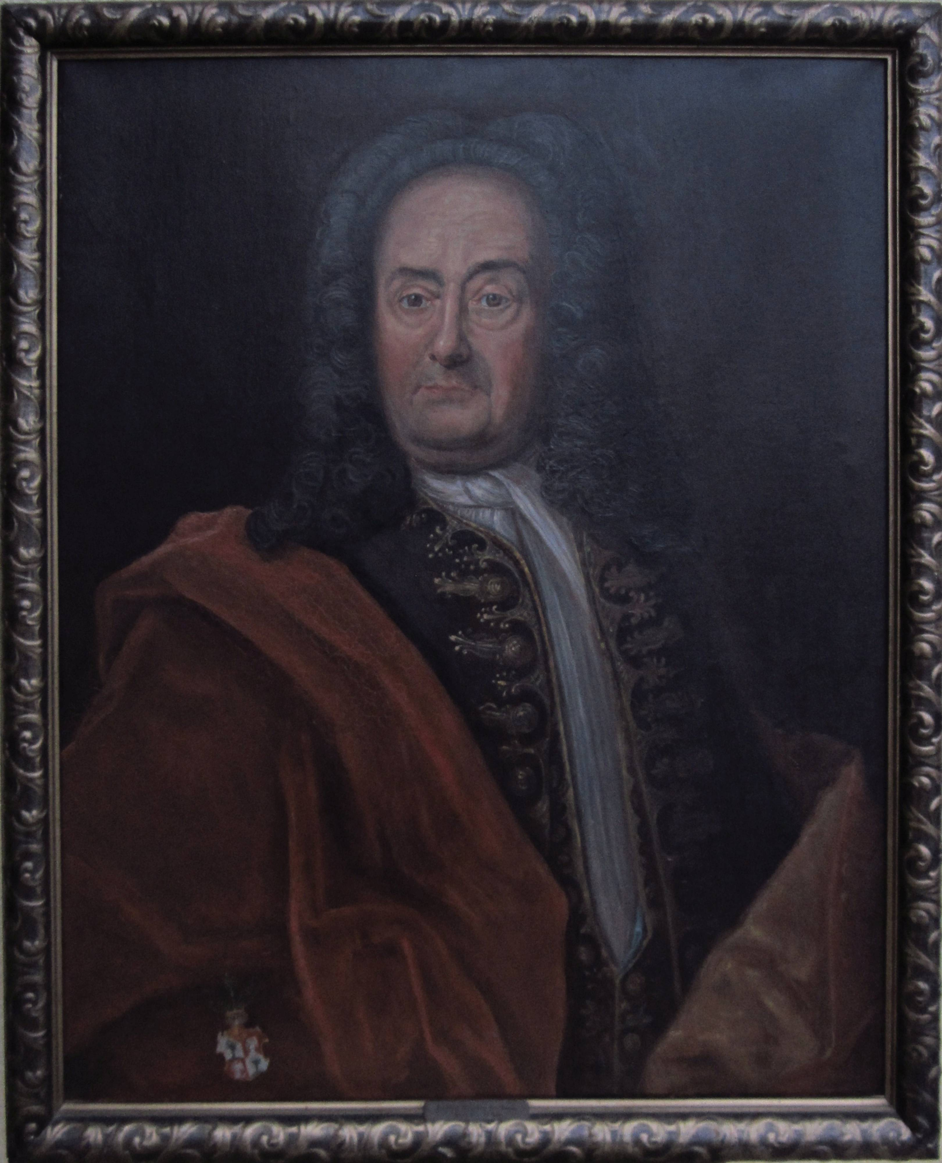 Justus Henning Böhmer (1674–1749), zu Lebzeiten der dargestellten Person geschaffenes Gemälde. Durch Marie Luise Ottilie von der Osten (* 25. Dez. 1856, † nach 1932) hiervon 1931 angefertigte originalgetreue Kopie in Öl auf Leinwand. Hiervon 2014 erstellte fotomechanische Reproduktion